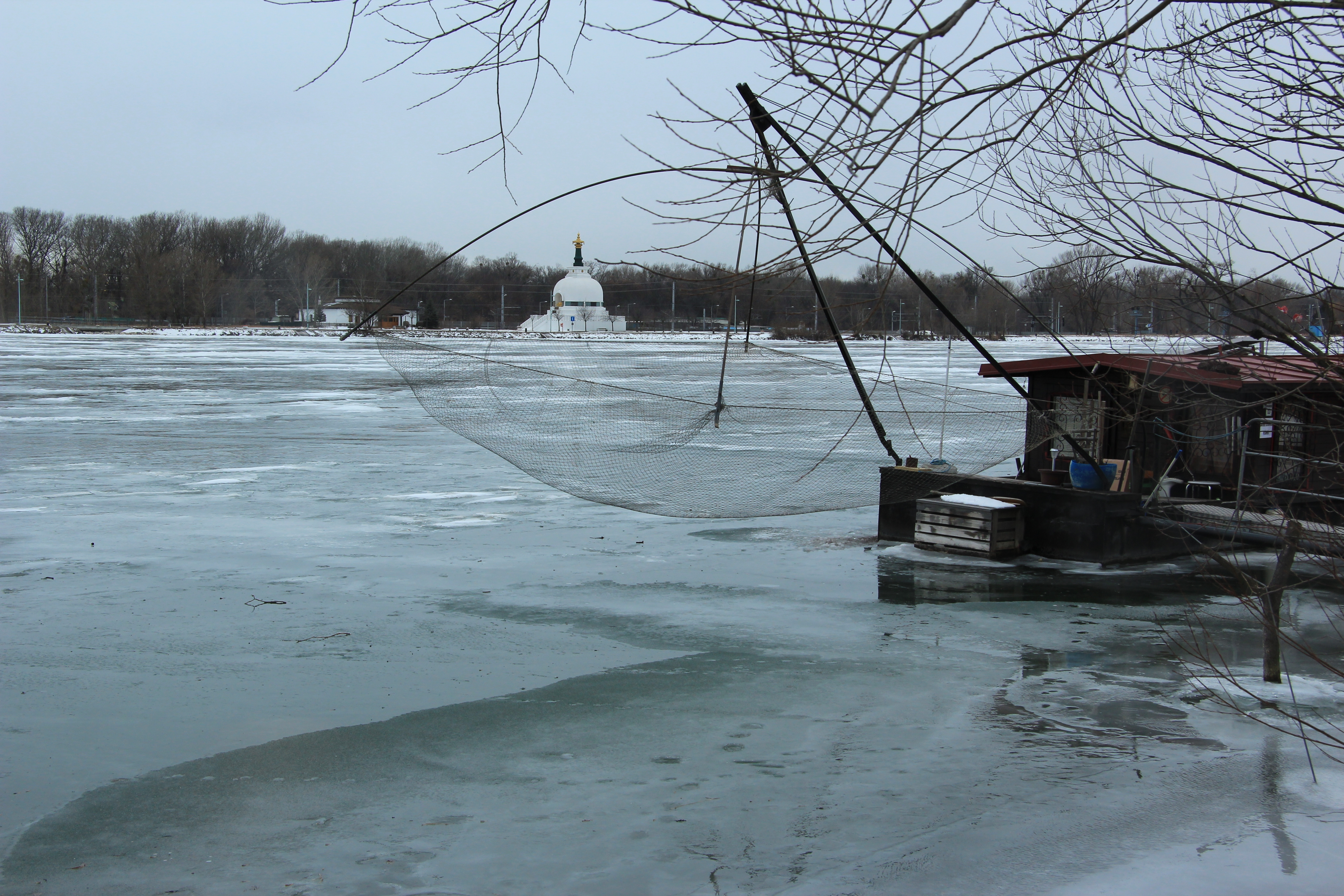 Donau in Wien im Stauraum des Kraftwerks Freudenau während der Kältewelle 2012